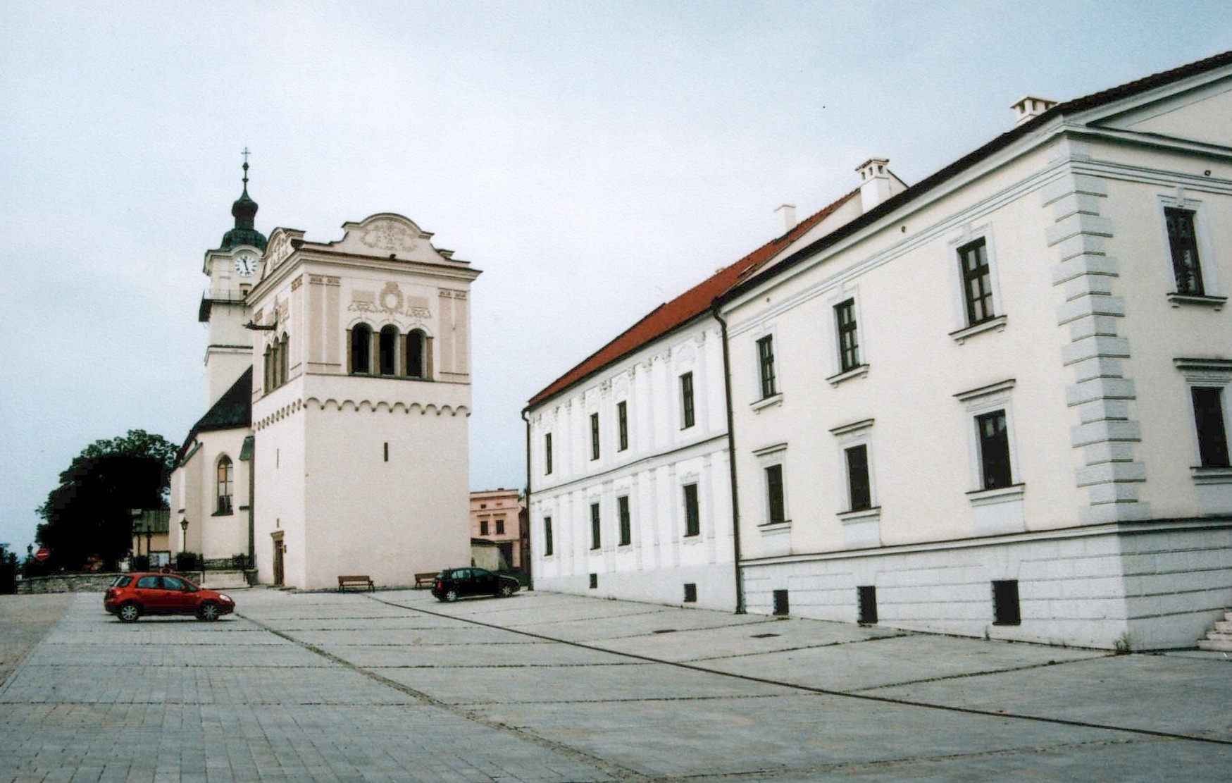 Spiska Sobota / Georgenberg. Rynek, kościół św. Jerzego i ratusz